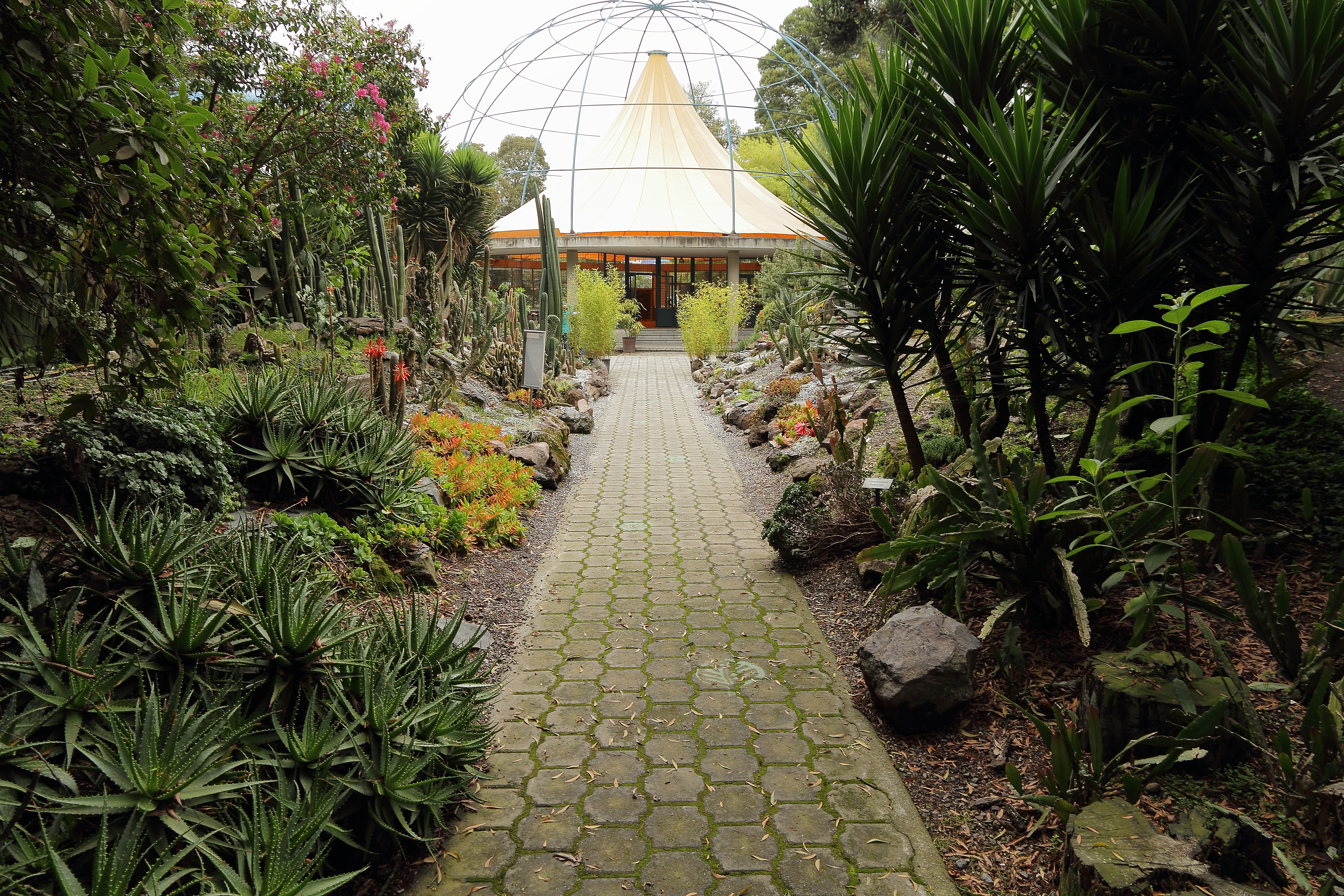 Quitos botaniska trädgård.